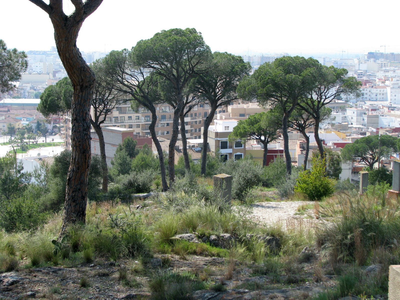 La muntanyeta del Salvador (Alcira).